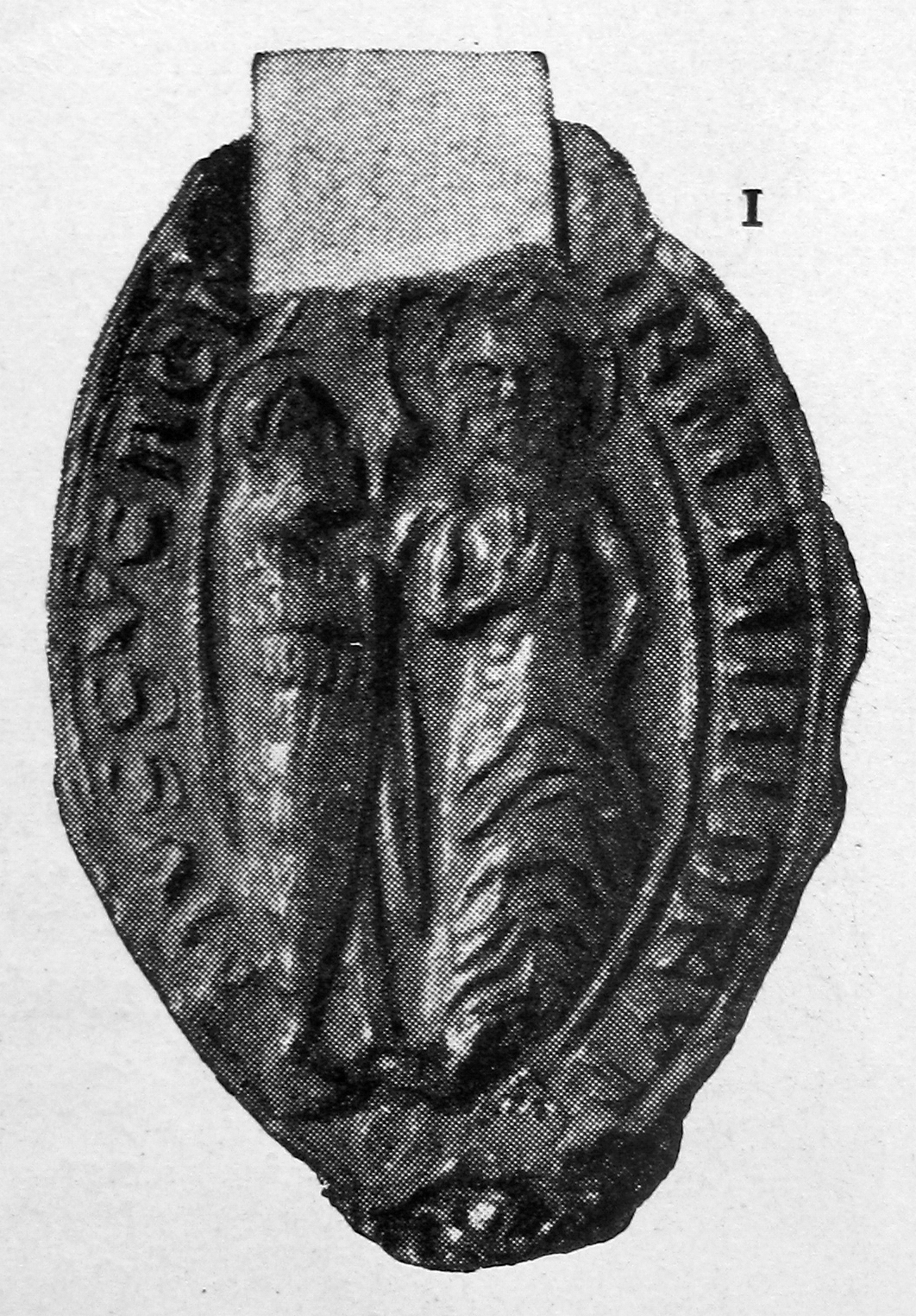 Soest, Siegel des Minoritenklosters in Soest von 1472. Im Staatsarchiv zu Münster, Soest, Minoriten 78a, Umschrift: s. frm . minorum domus susaci (vgl. Westfälische Siegel, Heft III, Tafel 120, No. 8)